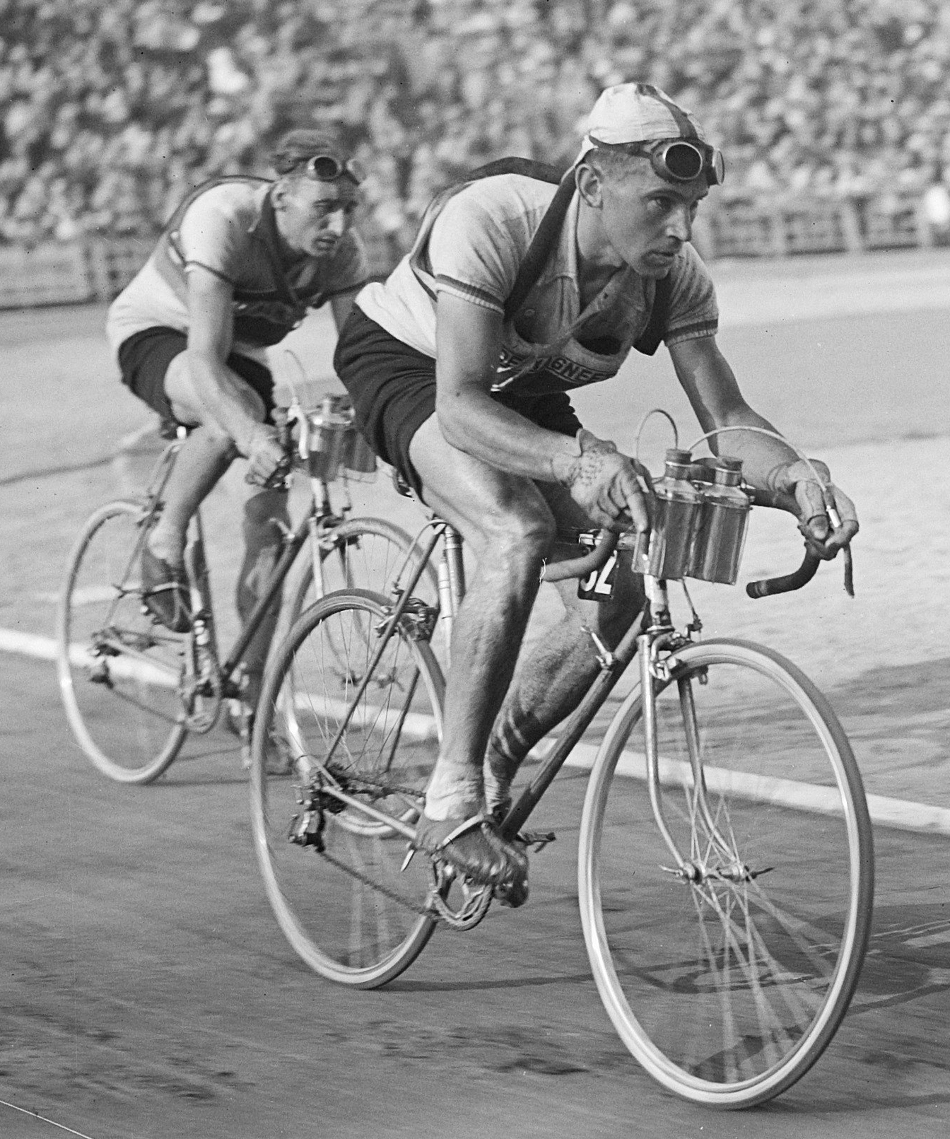 Tour de France, 2e etappe Reims-Brussel. Aankomst van de Nederlanders Jan Lambrichs en Huub Sijen